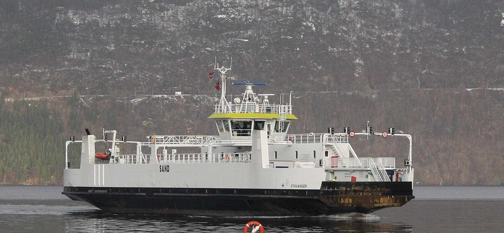 MF Sand